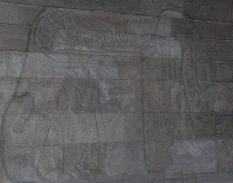 Anıtkabir rölyefi